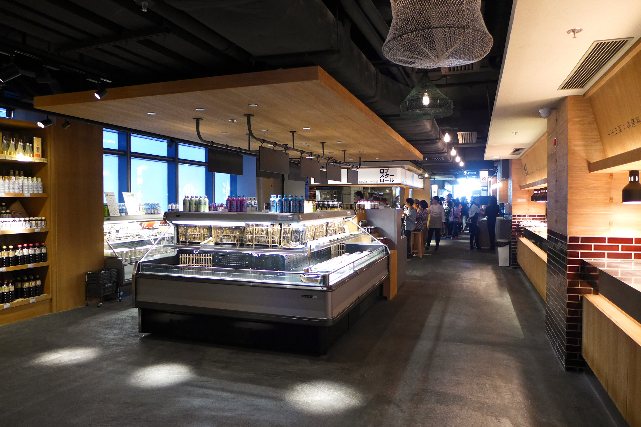 Yamataka Seafood Market Hong Kong Interior